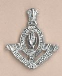 Current Regimental Cap Badge